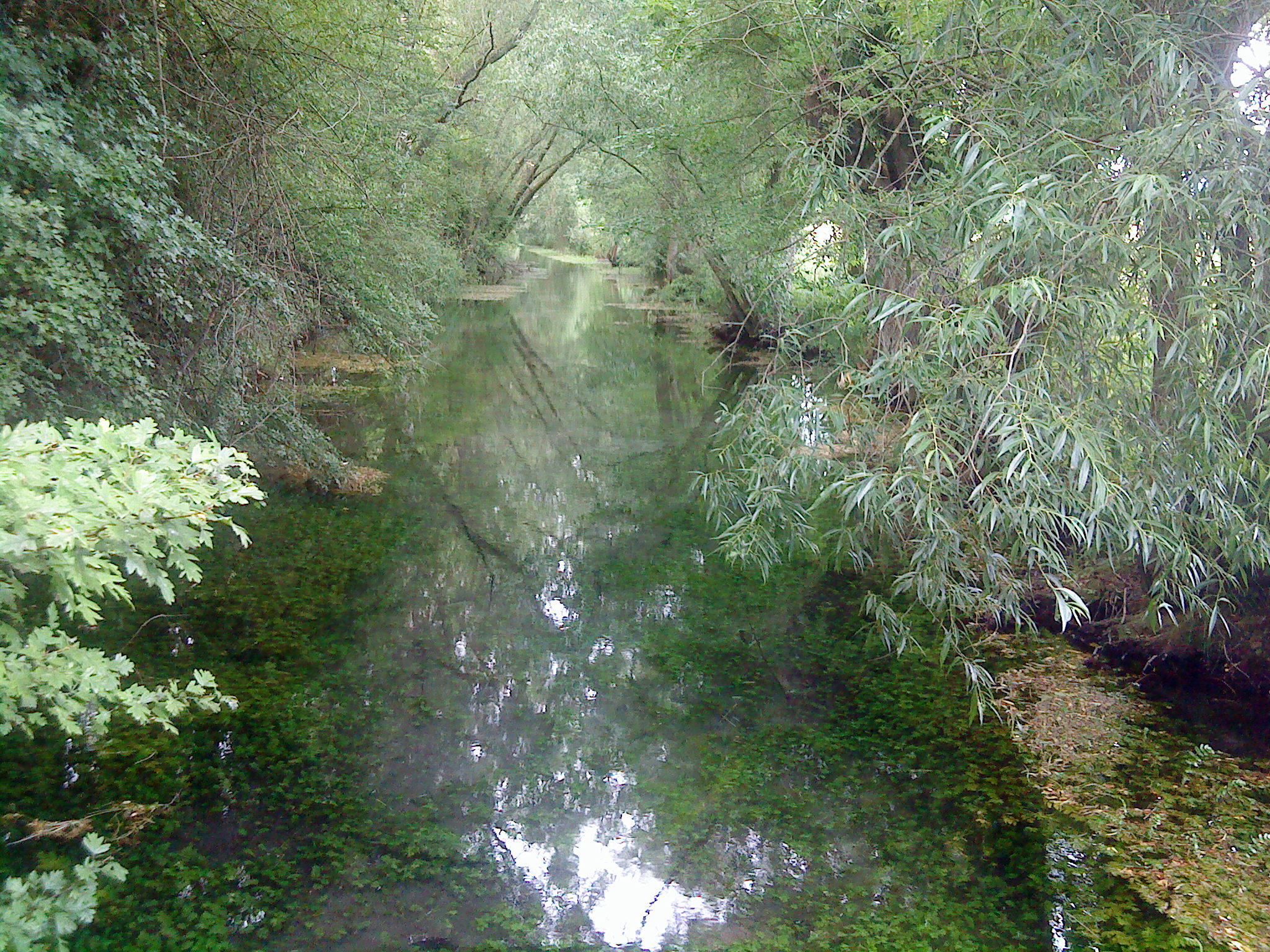 Die Salza in Nordhausen